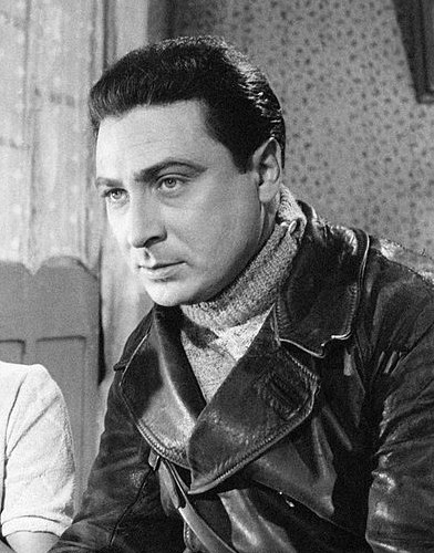 L'acteur français Gérard Oury dans une scène du film La Fille du fleuve (La donna del fiume), tourné en 1954 et sorti en 1955.